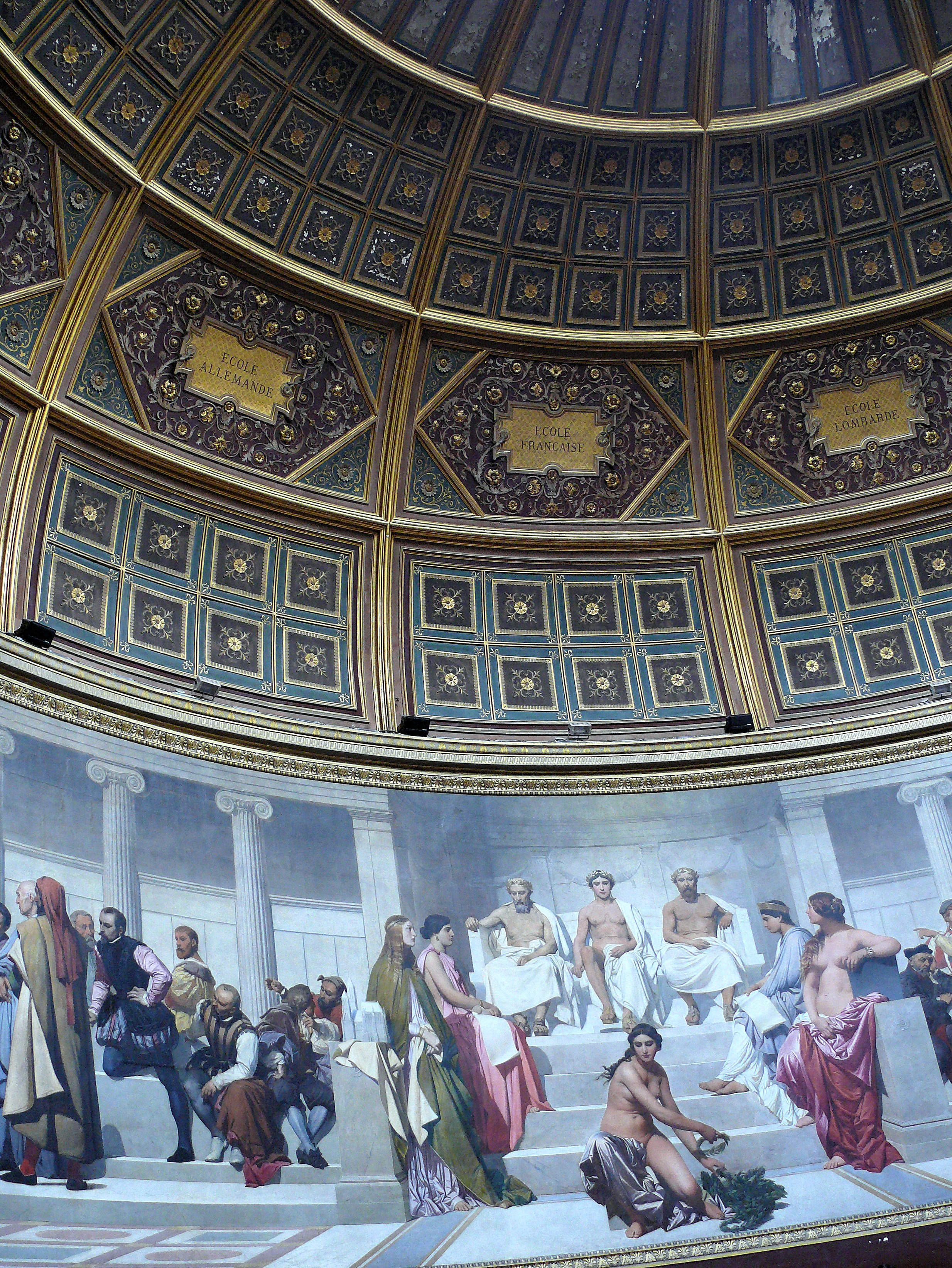 Ecole des Beaux-Arts de Paris - Palais des Etudes - Amphithéâtre d'honneur